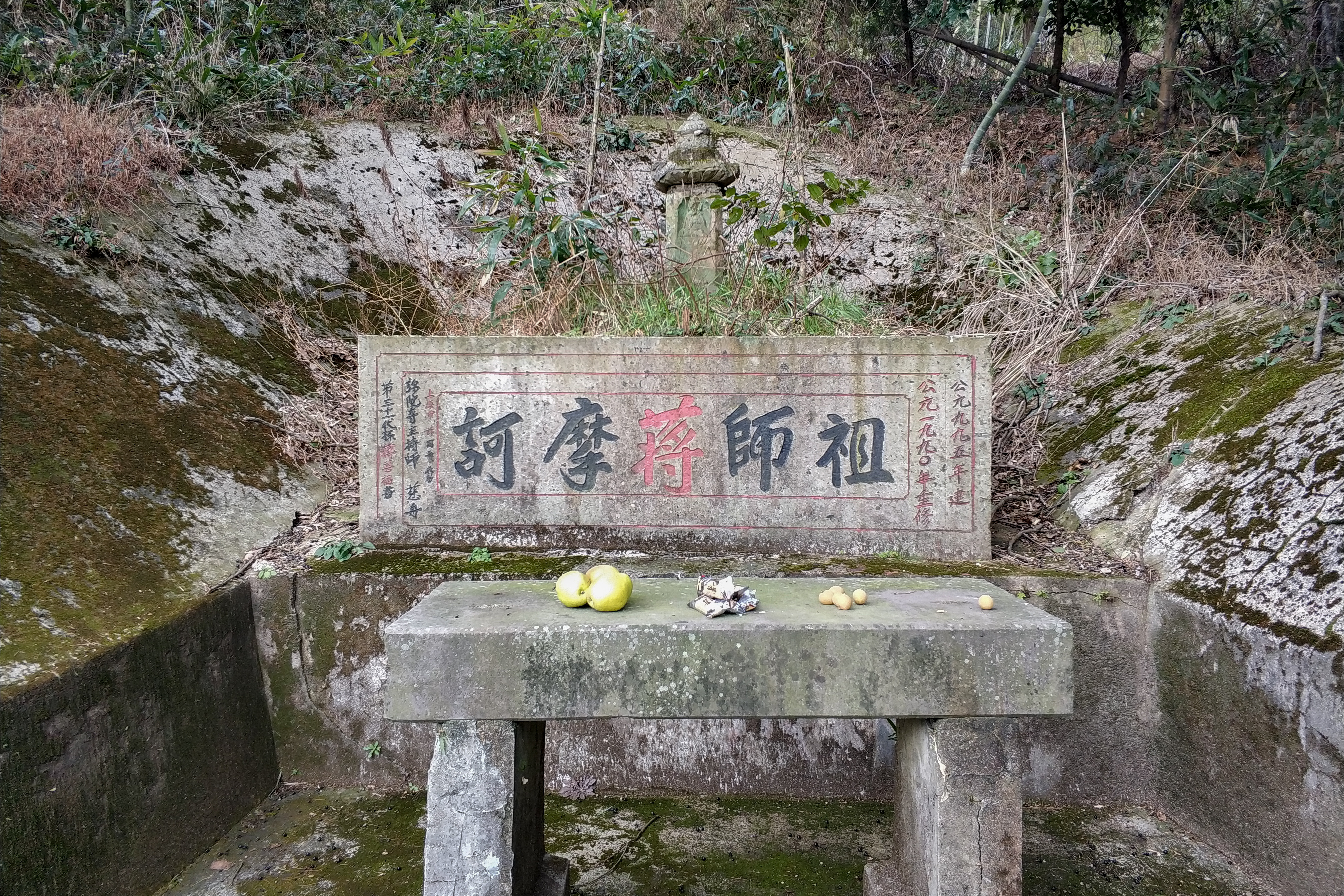 蒋中正远祖蒋宗霸墓